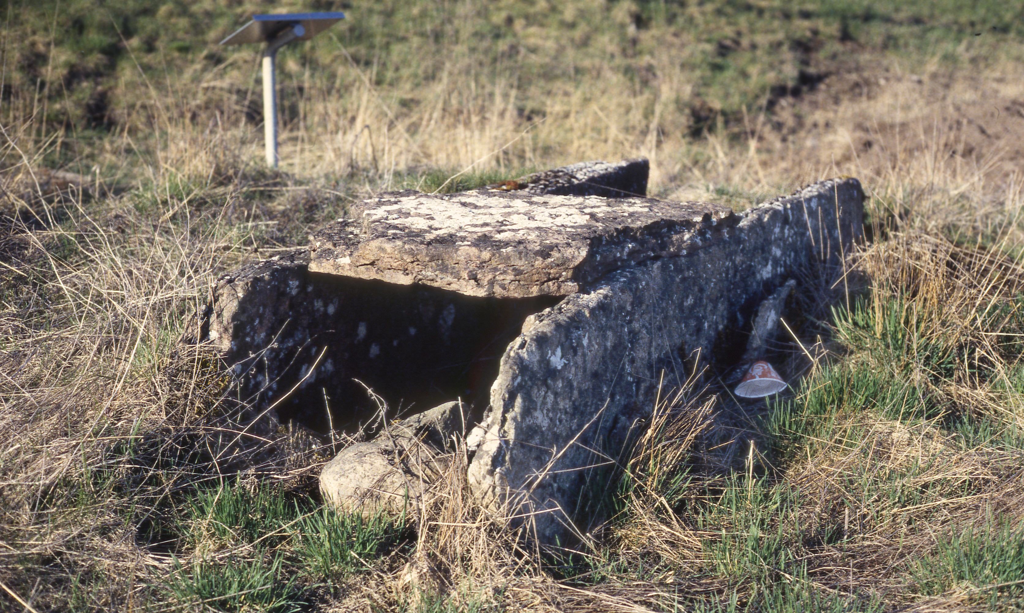 Nästegårdens hällkista (RAÄ-nr Falköpings västra 1:1) ligger strax väster om Falköping, Falköpings kommun, f.d. Skaraborgs län, Västergötland, Västra Götalands län, Sverige. Stenkammargraven brukar klassificeras som hällkista, men likheterna med Slutarpsdösen gör det möjligt att det snarare är fråga om en kistformad dös.